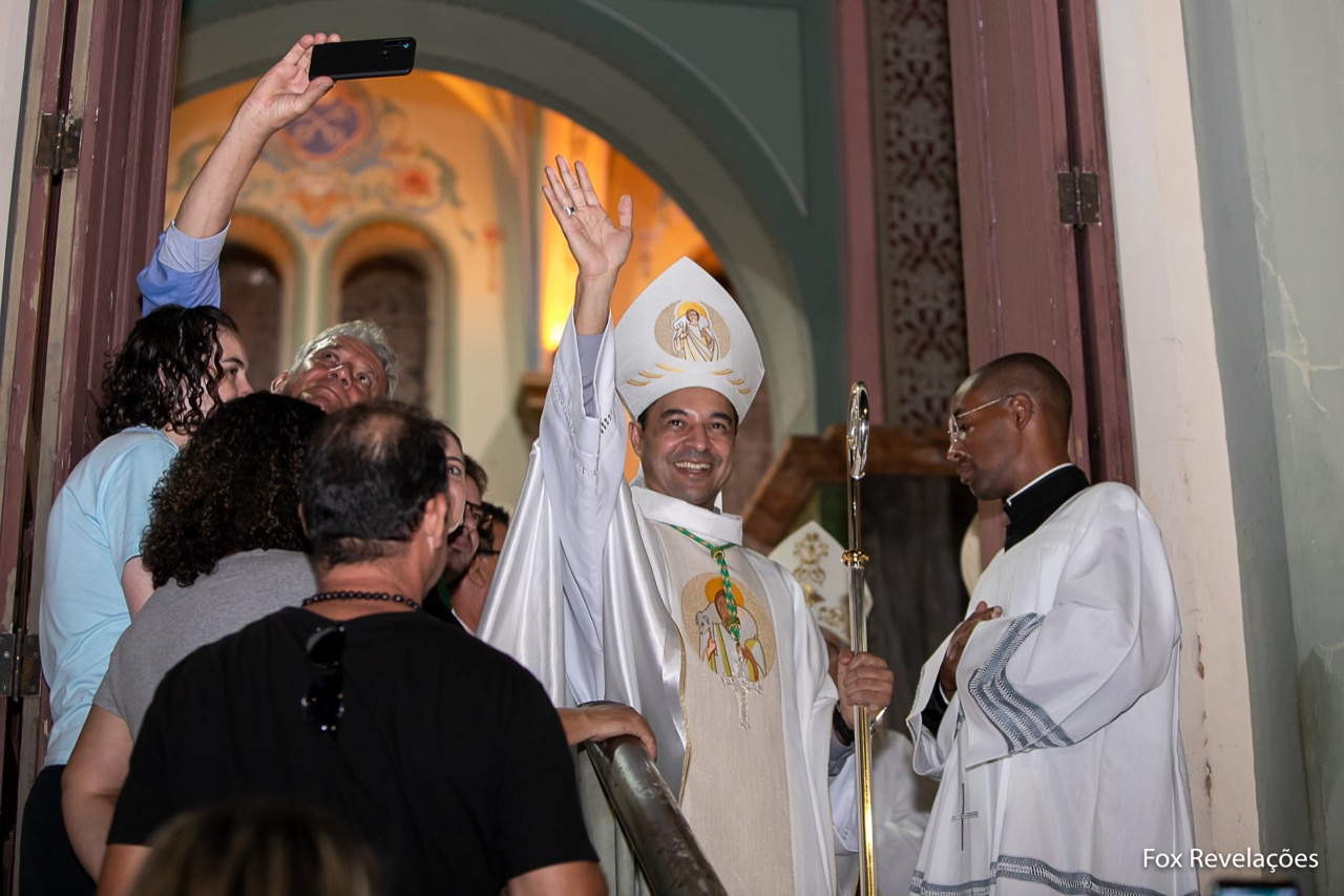 Sendo acolhido pelos fiéis após celebração da Missa